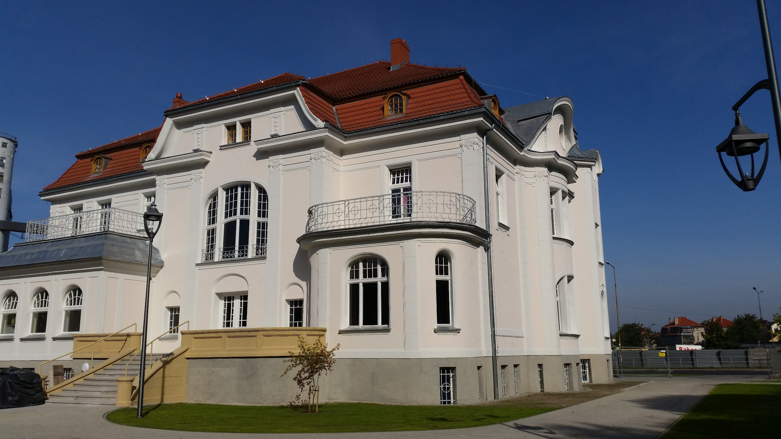 Budynek dzisiejszego MDK Stargard